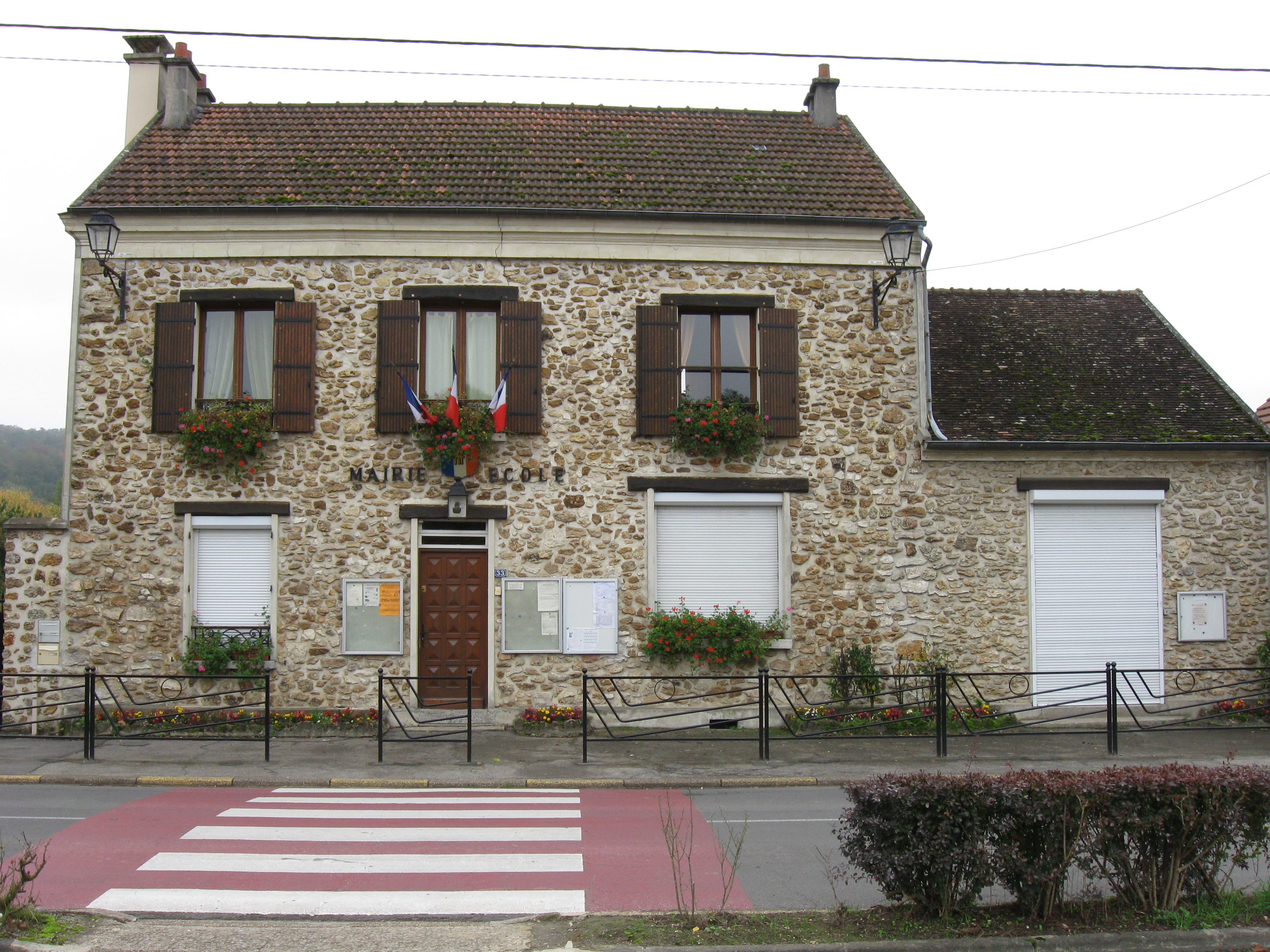 Mairie de Romeny-sur-Marne. (département de l'Aisne, région Picardie).